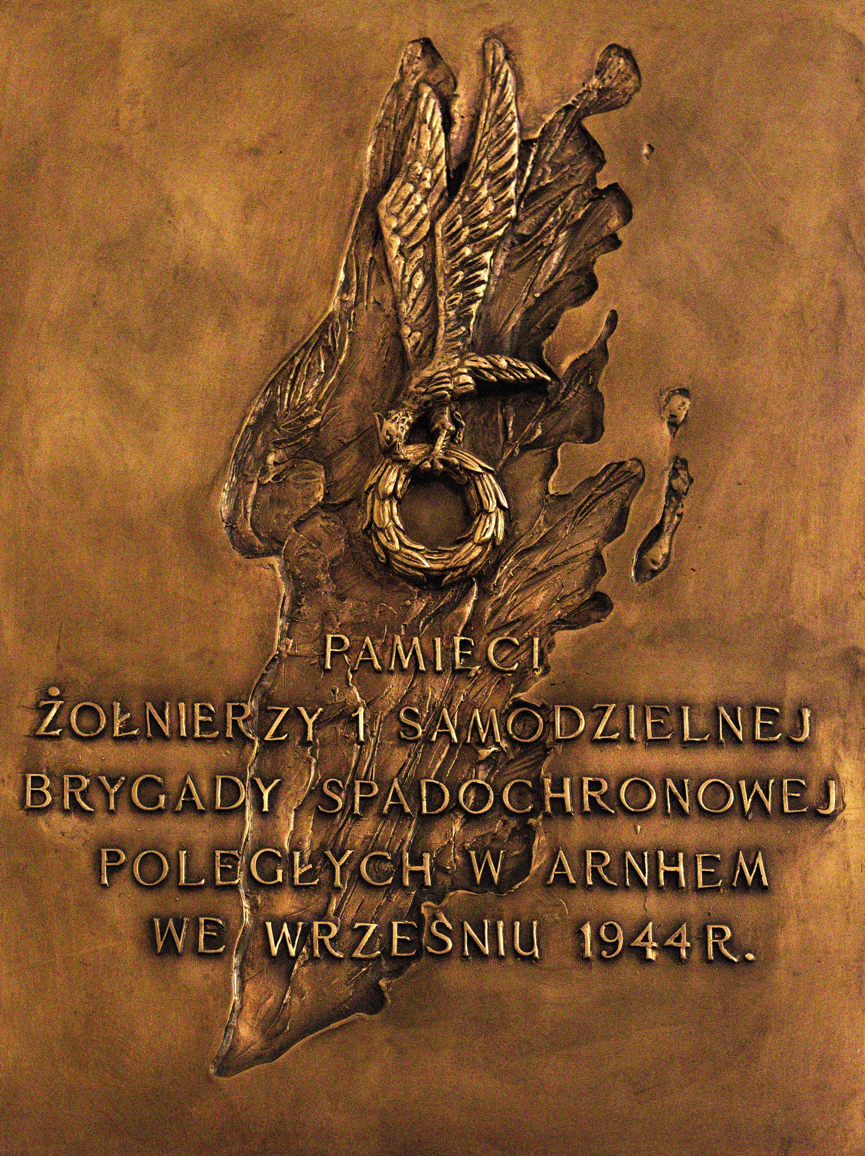 Tablica w kościele św. Agnieszki w Krakowie poświęcona żołnierzom 1. Samodzielnej Brygady Spadochronowej gen. Sosabowskiego poległym w czasie operacji Market-Garden.